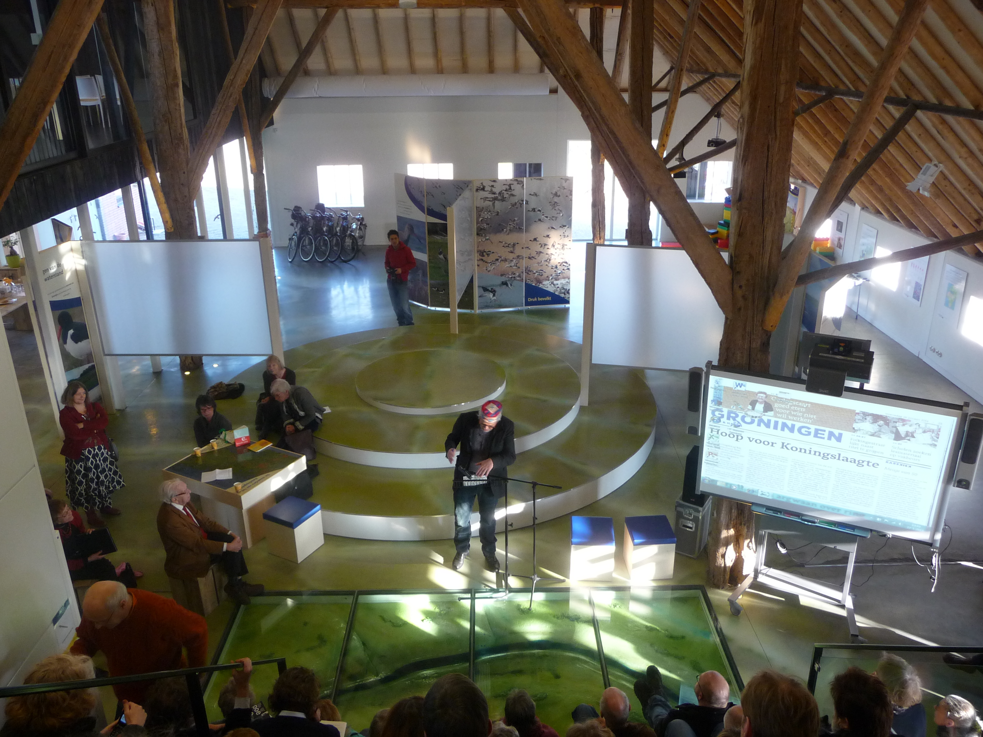 interieur van de Buitenplaats Reitdiep tijdens de Gedichtendag 2011 - Poëzie in de potstal